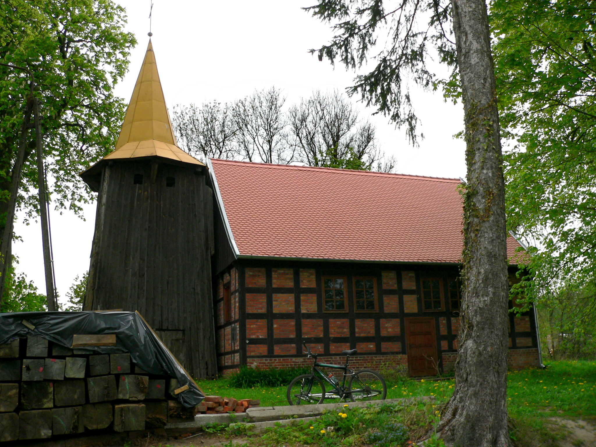 Laski Wałeckie - dawny kościół ewangelicki, obecnie rzymskokatolicki fililany p.w. MB Szkaplerznej z 2. poł. XVII w. 08.1961